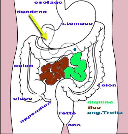 Modifica dell'immagine 'Schema intestin.png' presente su Commons autoreRocco Cusari (msg) 18:53, 23 feb 2009 (CET)